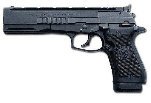 Beretta 87 Target Pistol